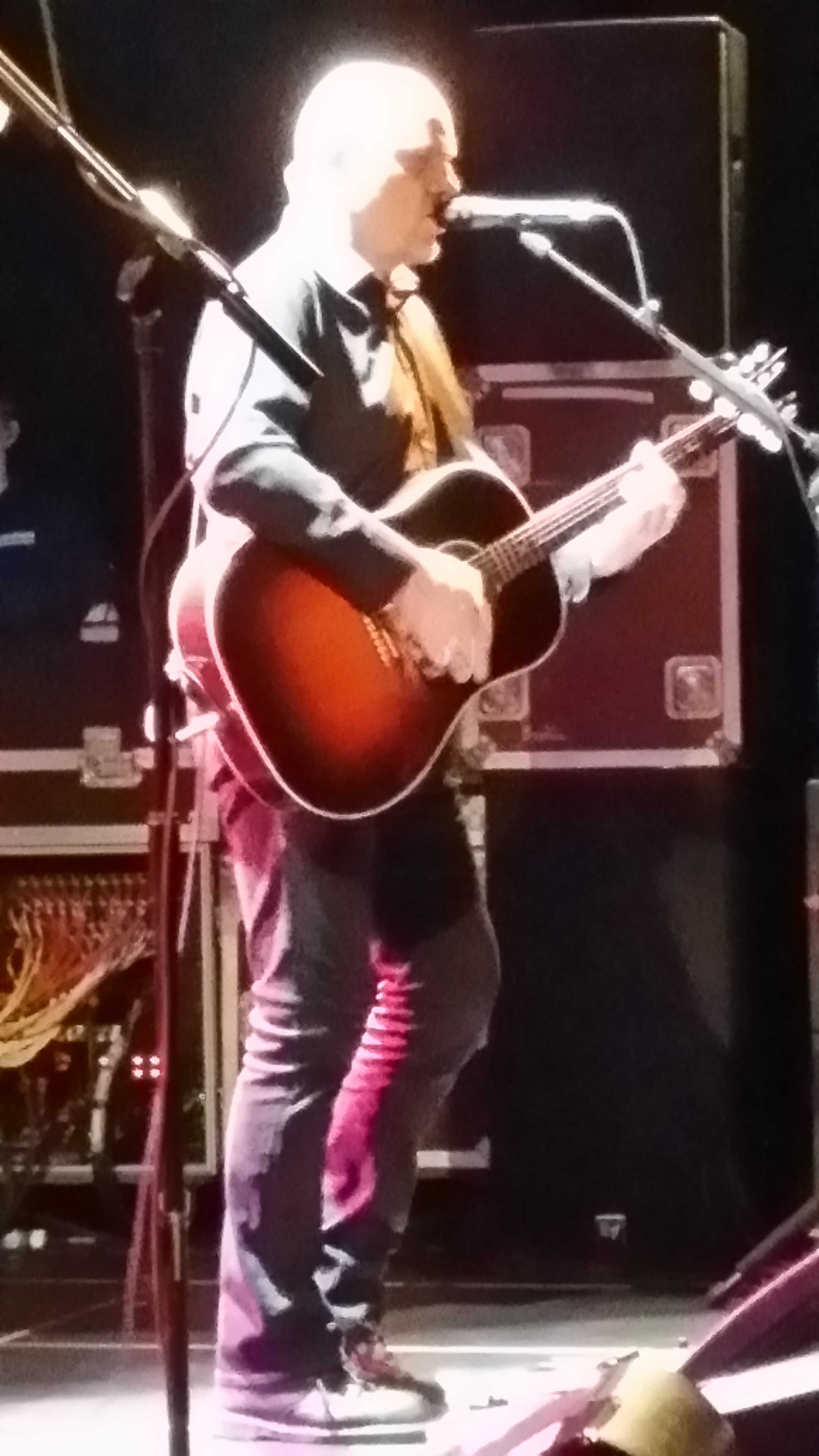 The Stranglers. Intxaurrondo Kultur Etxean.2014-04-05. Donostiklubaren barruan egin zuen kontzertua